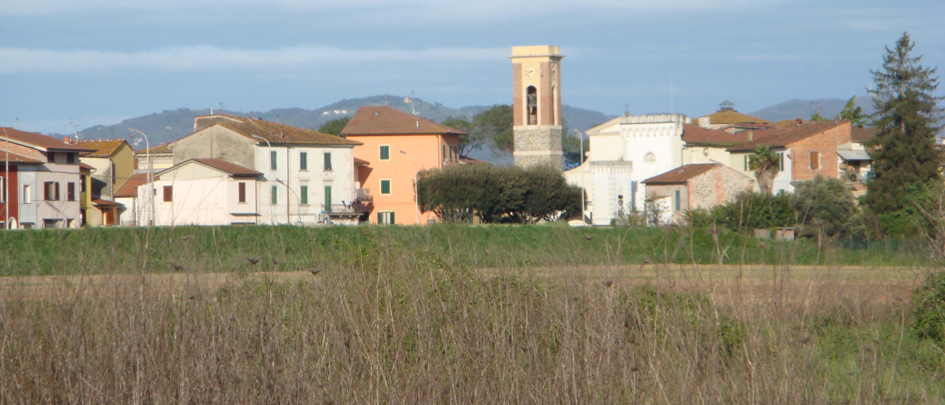 Veduta del centro di Ponte Buggianese (Provincia di Pistoia, Italia)